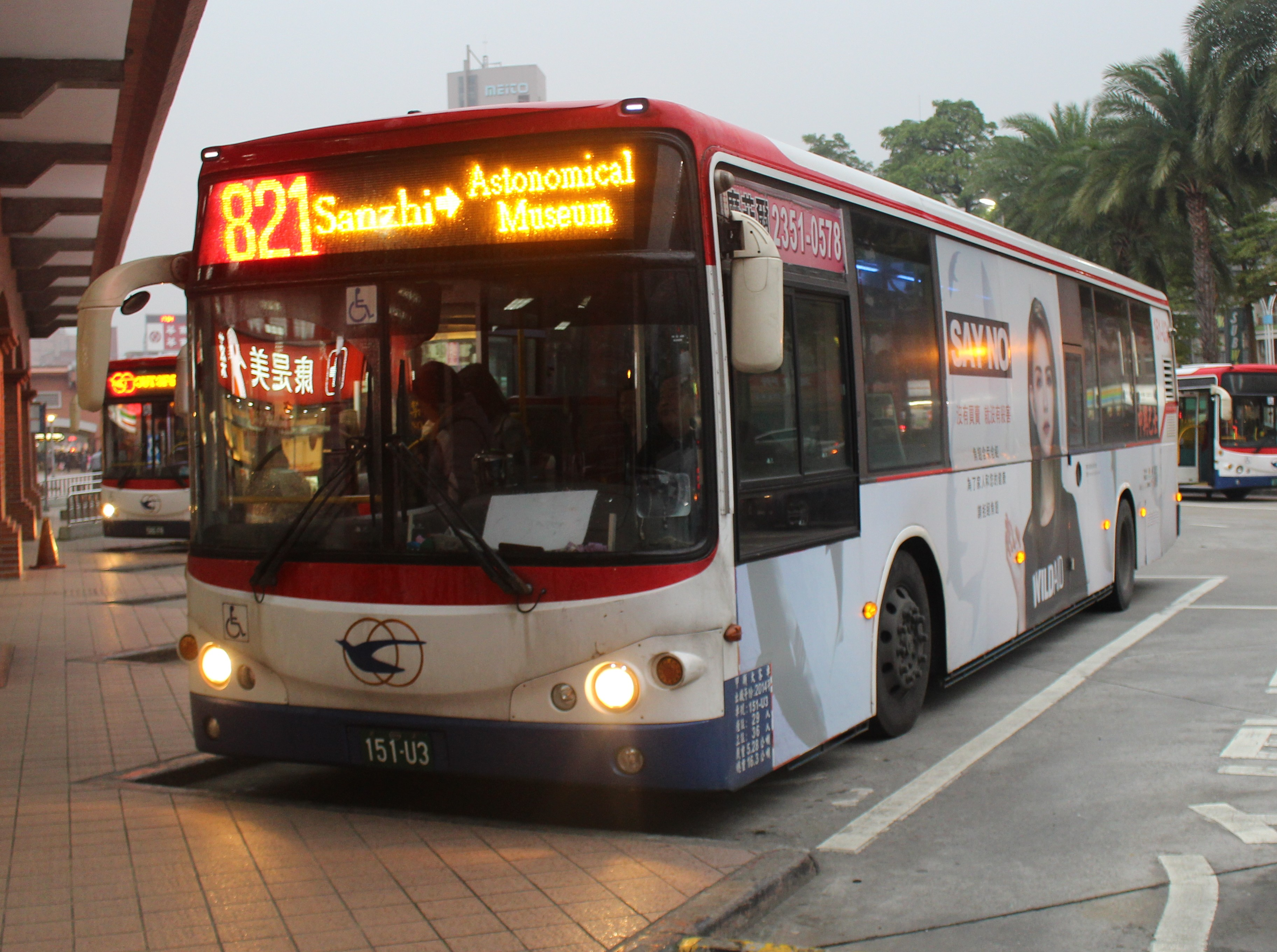 中興巴士KINGLONG KL6120U1 151-U3 821